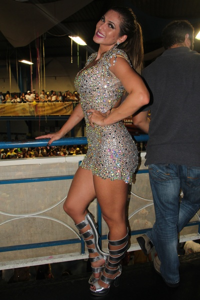 A atriz e modelo Lívia Andrade em 2016